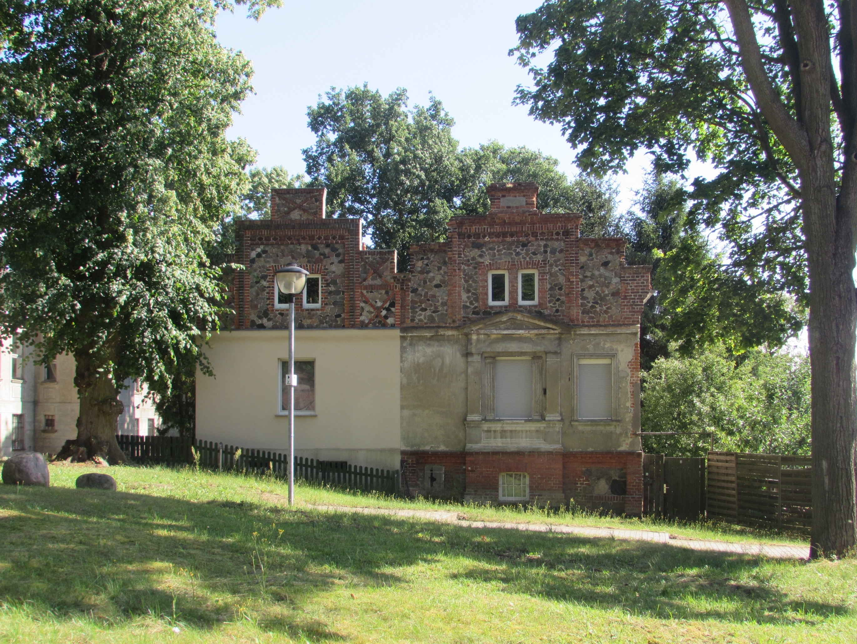 bedienstetenhäuser gutshaus rogäsen